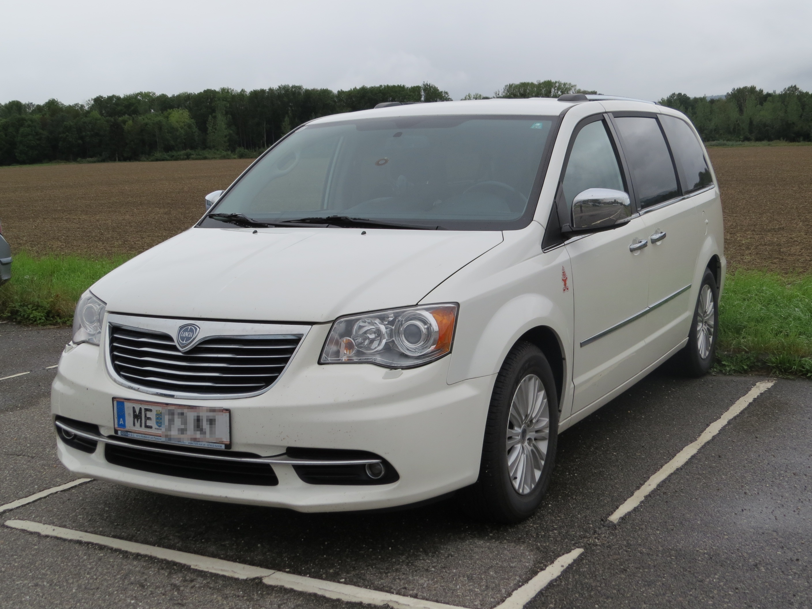 Bahnhof Ybbs an der Donau